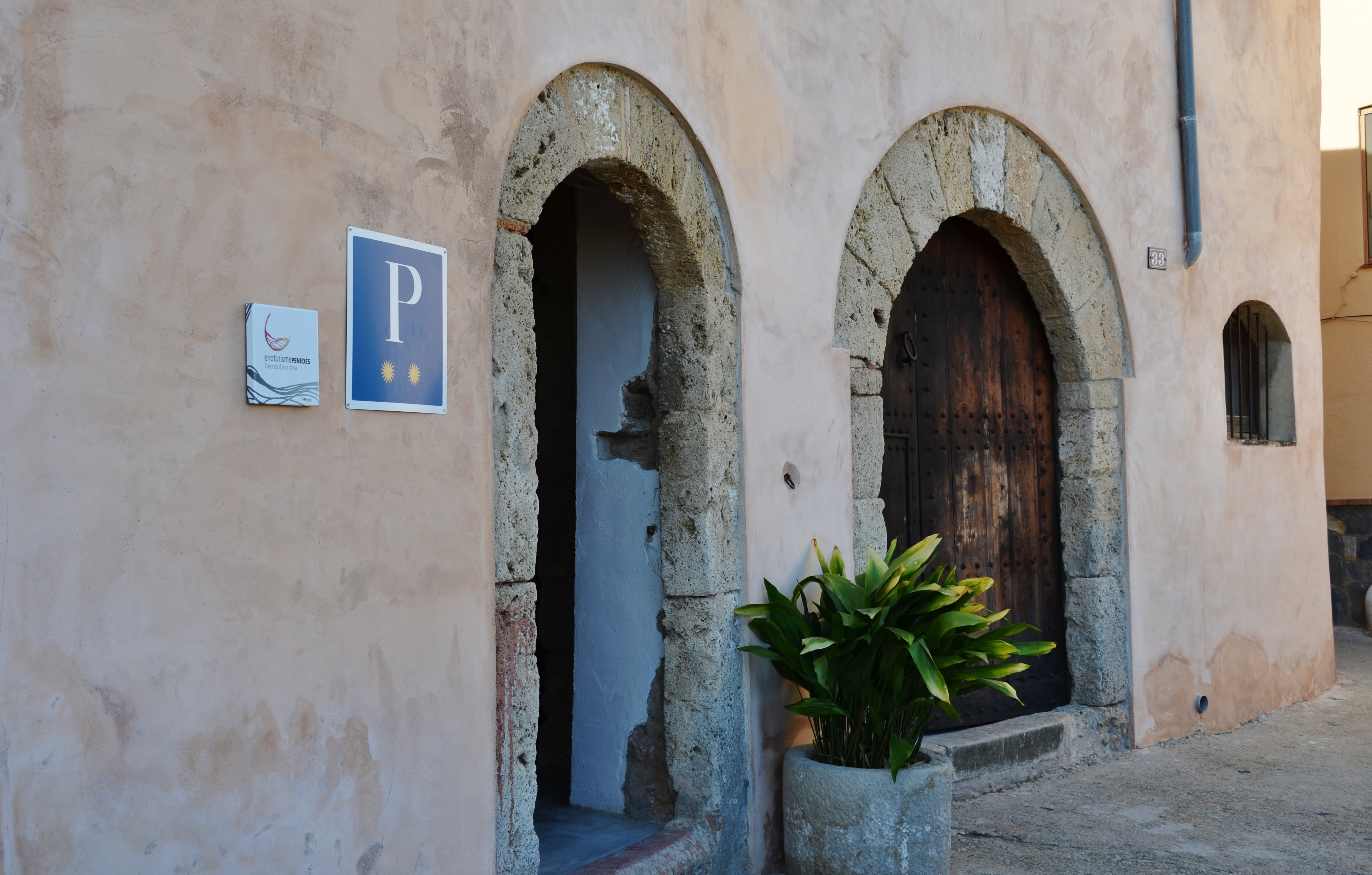 Portal de Cal Querol (Sant Pere de Riudebitlles)